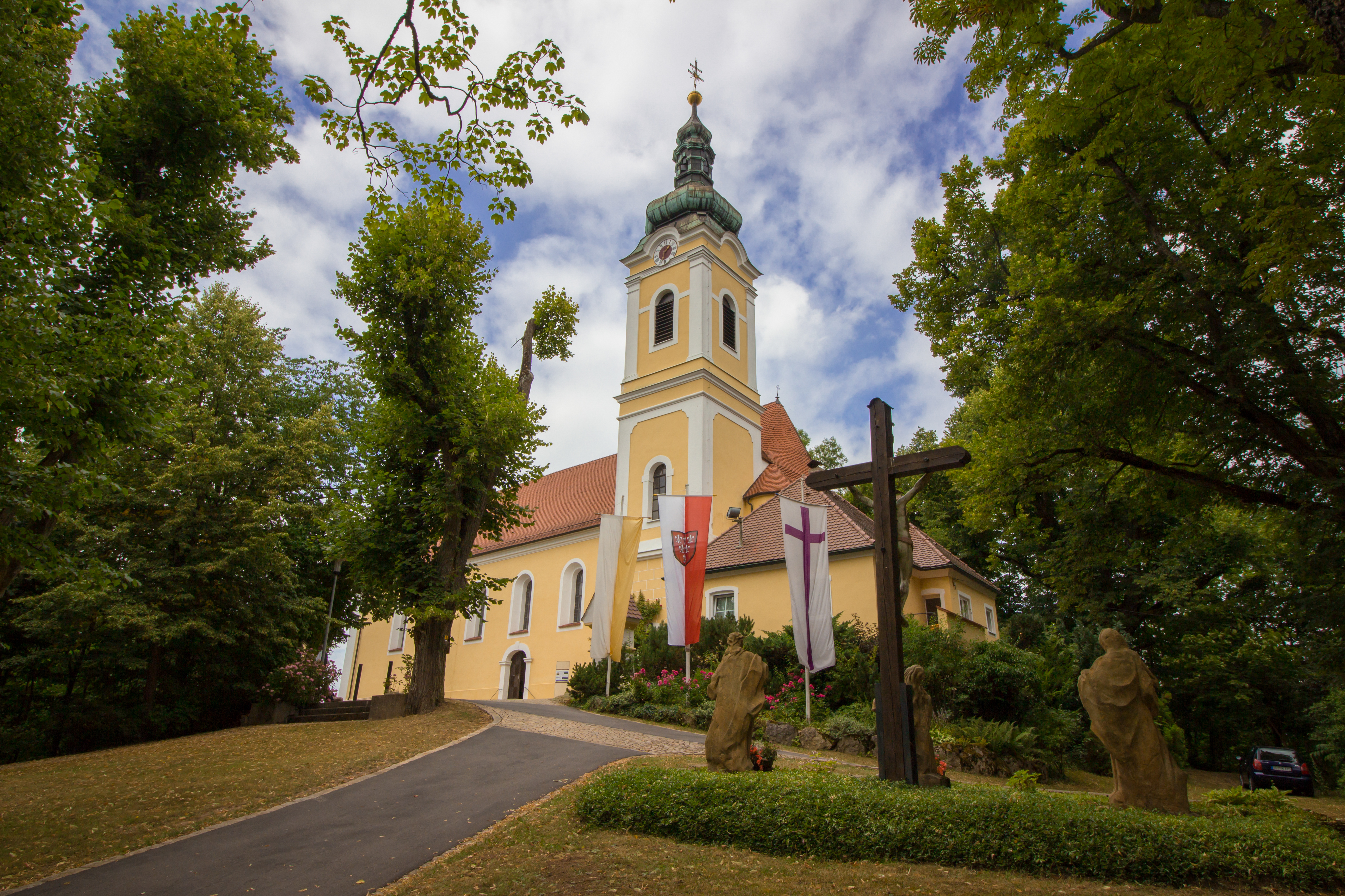 Annabergkirche (St. Anna) in Sulzbach-Rosenberg, Bayern. Fotografiert mit Beflaggung anlässlich des Annabergfests 2015